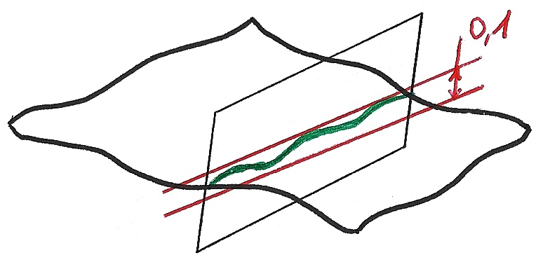 Explication de la rectitude